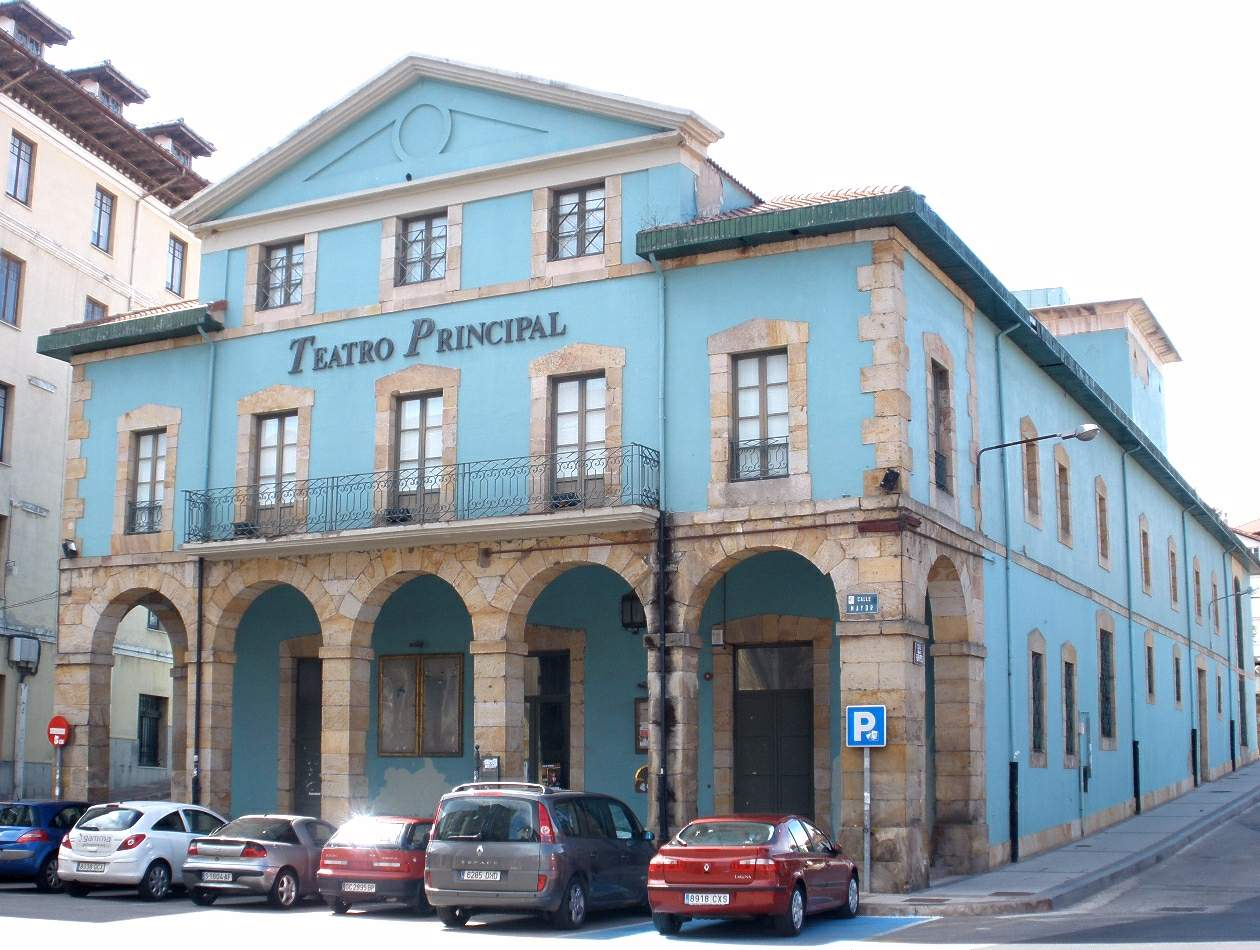 Teatro Principal (Reinosa, Cantabria)